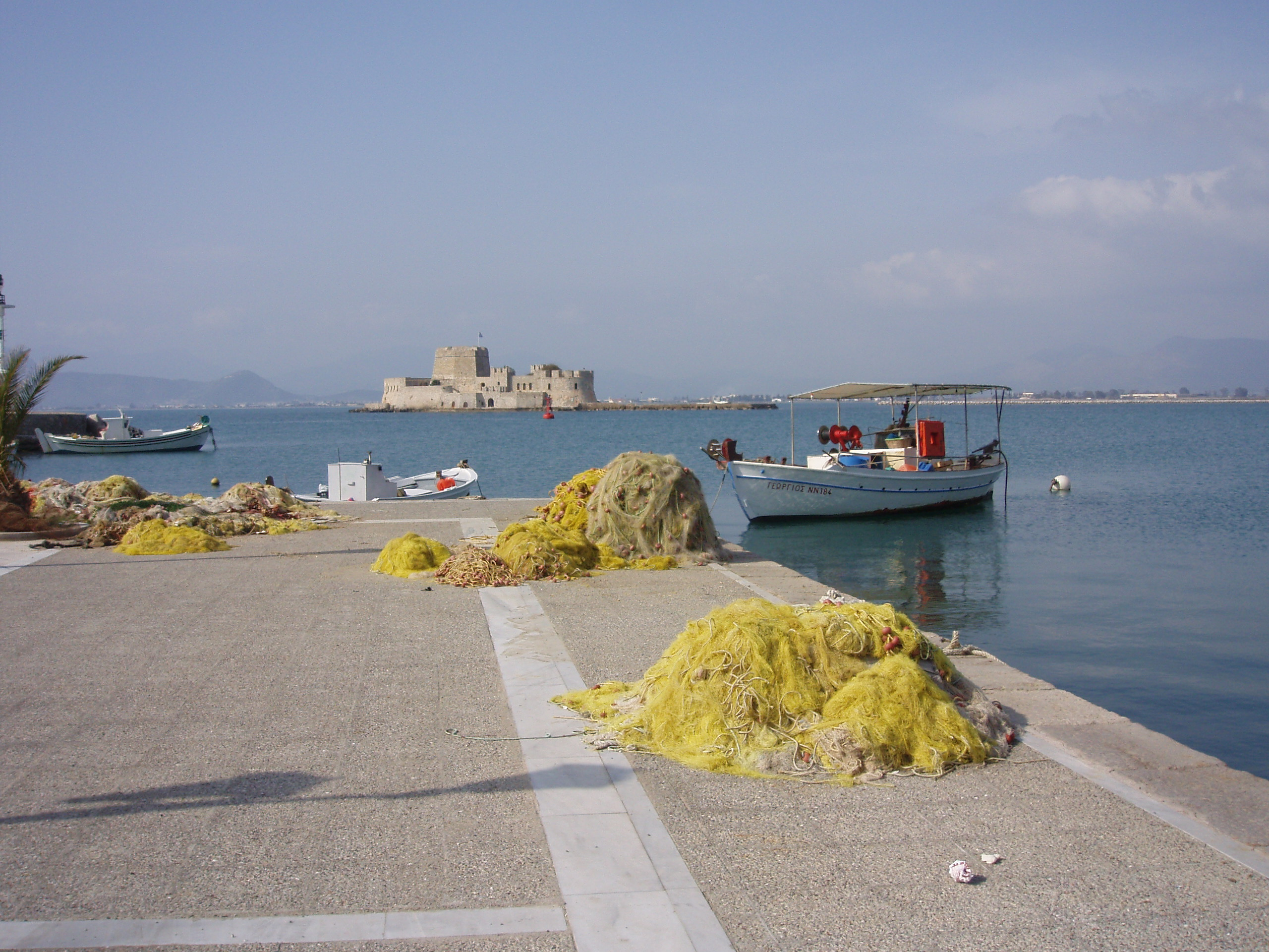 Nauplia, Blick auf Burzi